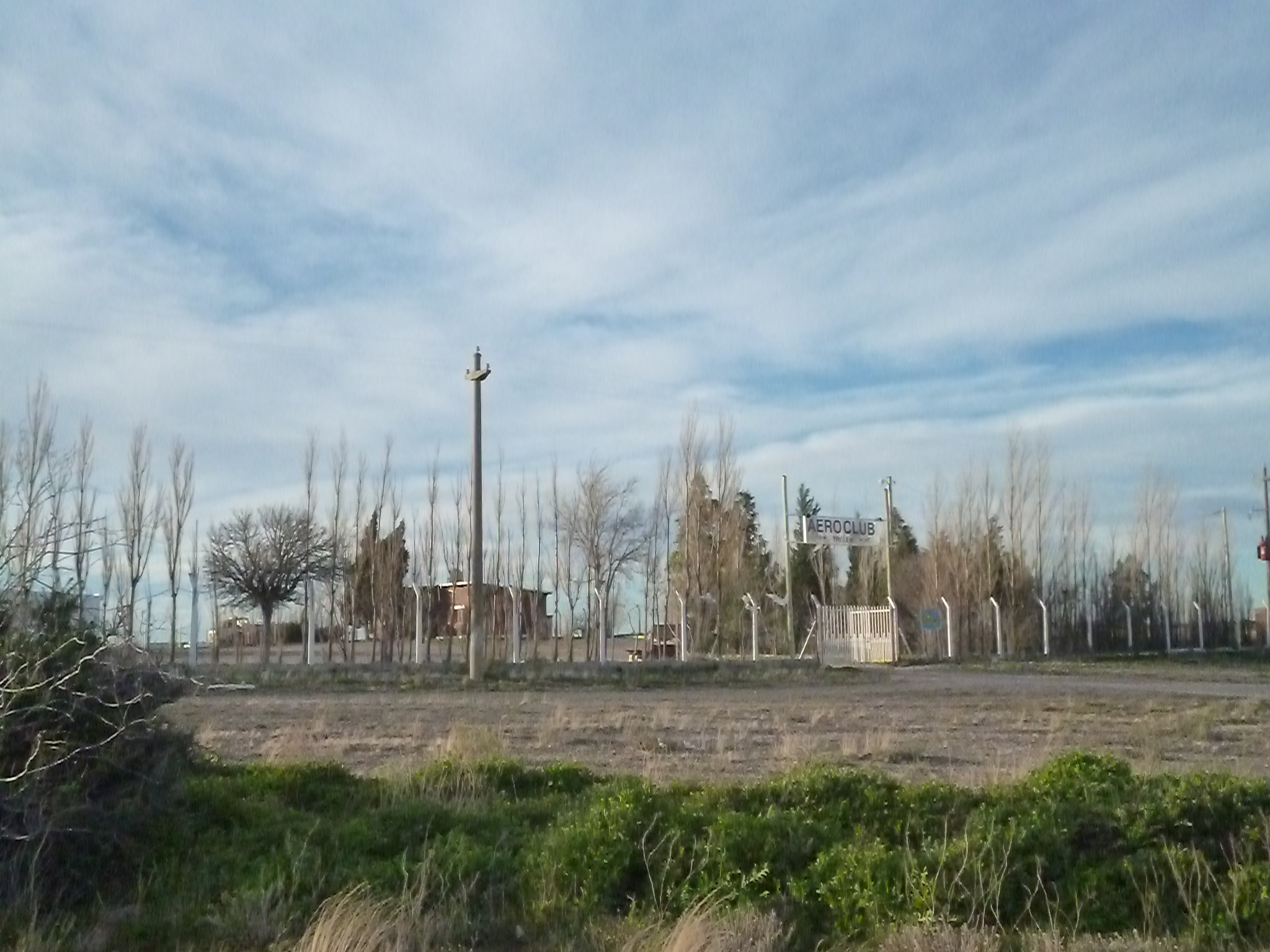 Entrada al aeroclub de Trelew